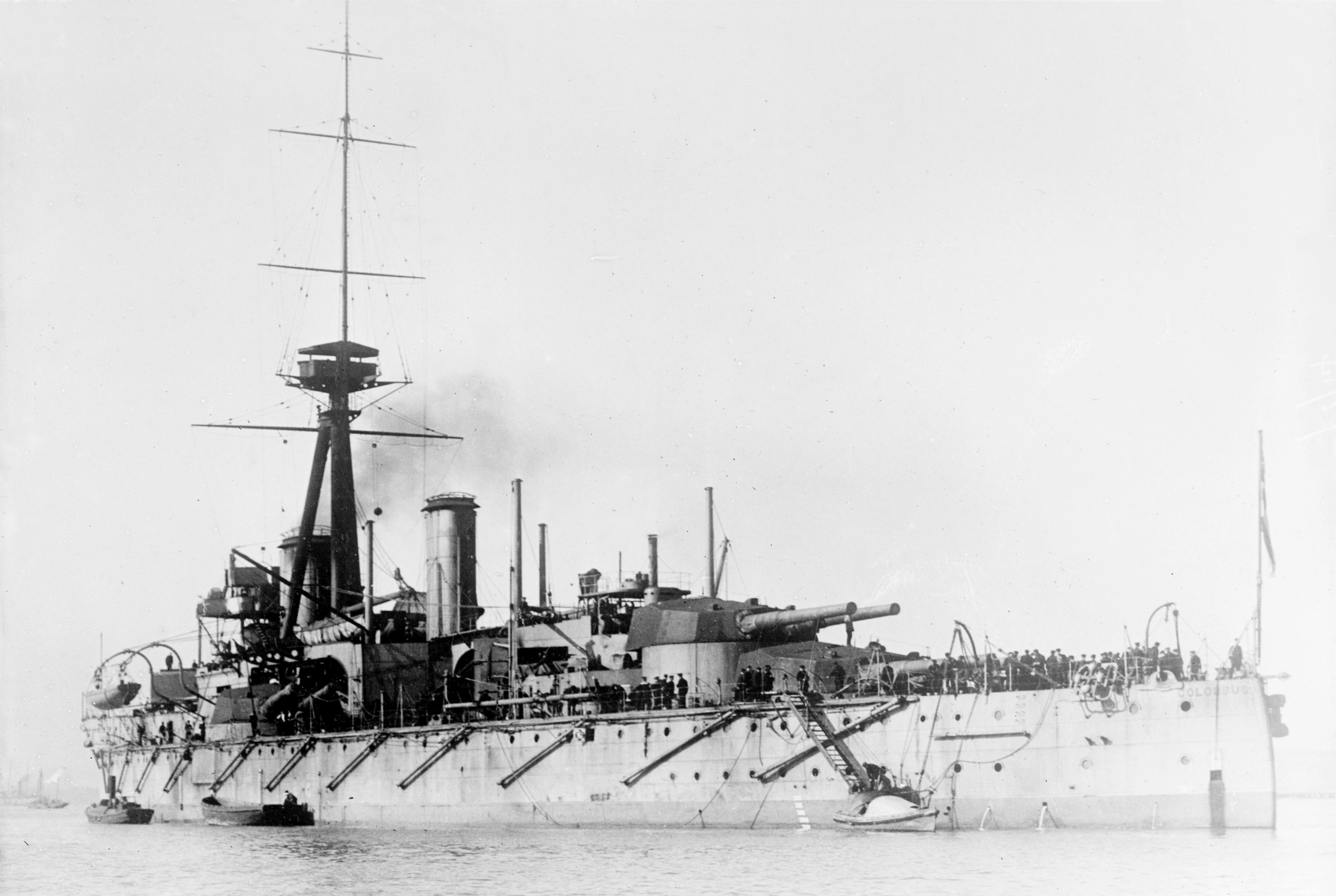 HMS Colossus